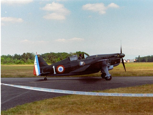 Aérodrome de Haguenau, Morane-Saulnier MS.406, D-3801 suisse. Cet avion (le seul encore en état de vol) est un D-3801, la dénomination du MS 406 construit sous licence en Suisse